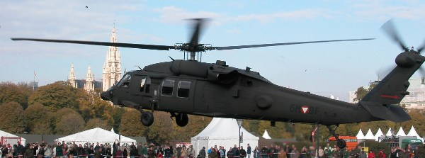 Black Hawk des Österreichischen Bundesheers